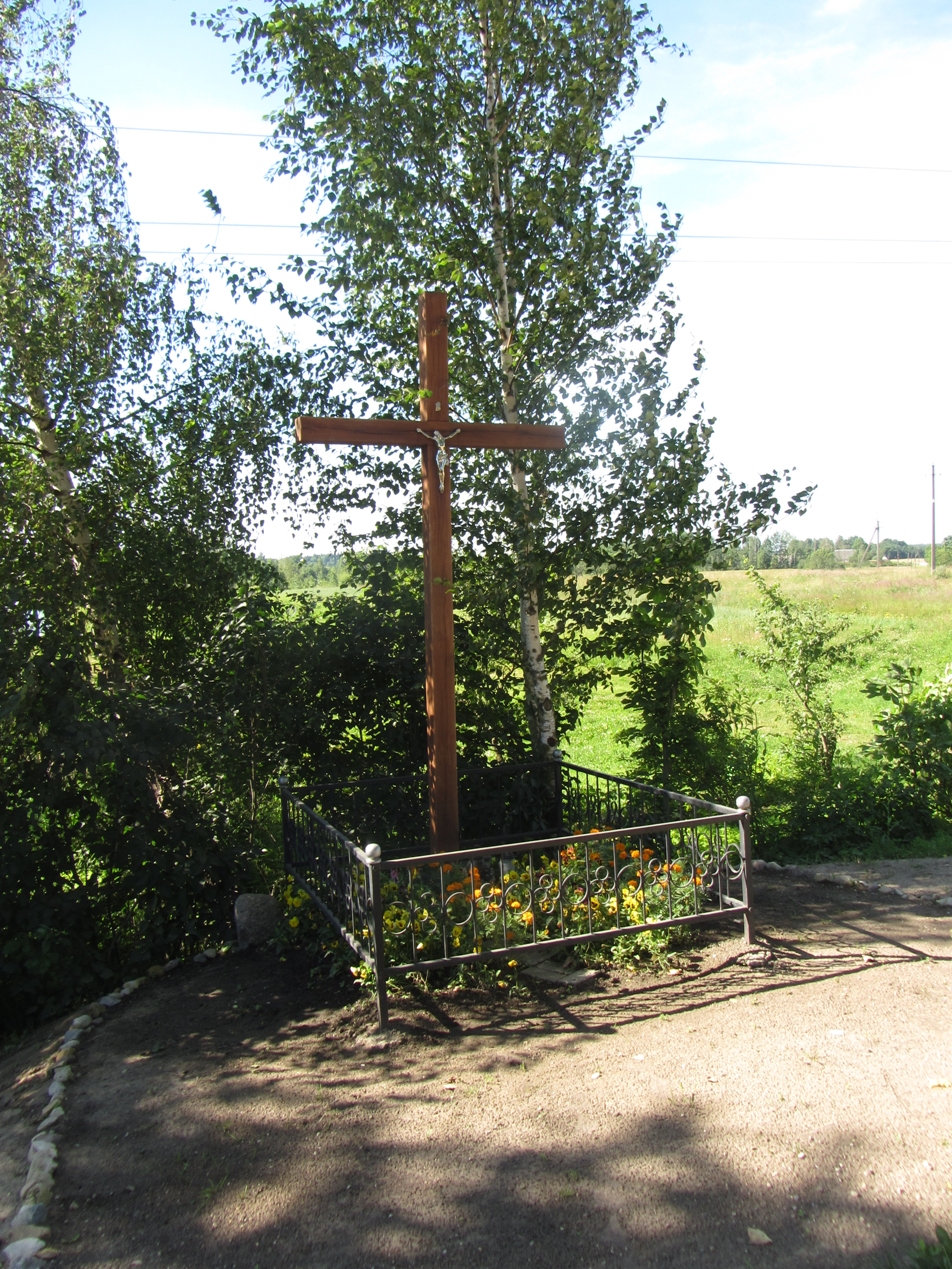 Šriubiškės 14272, Lithuania